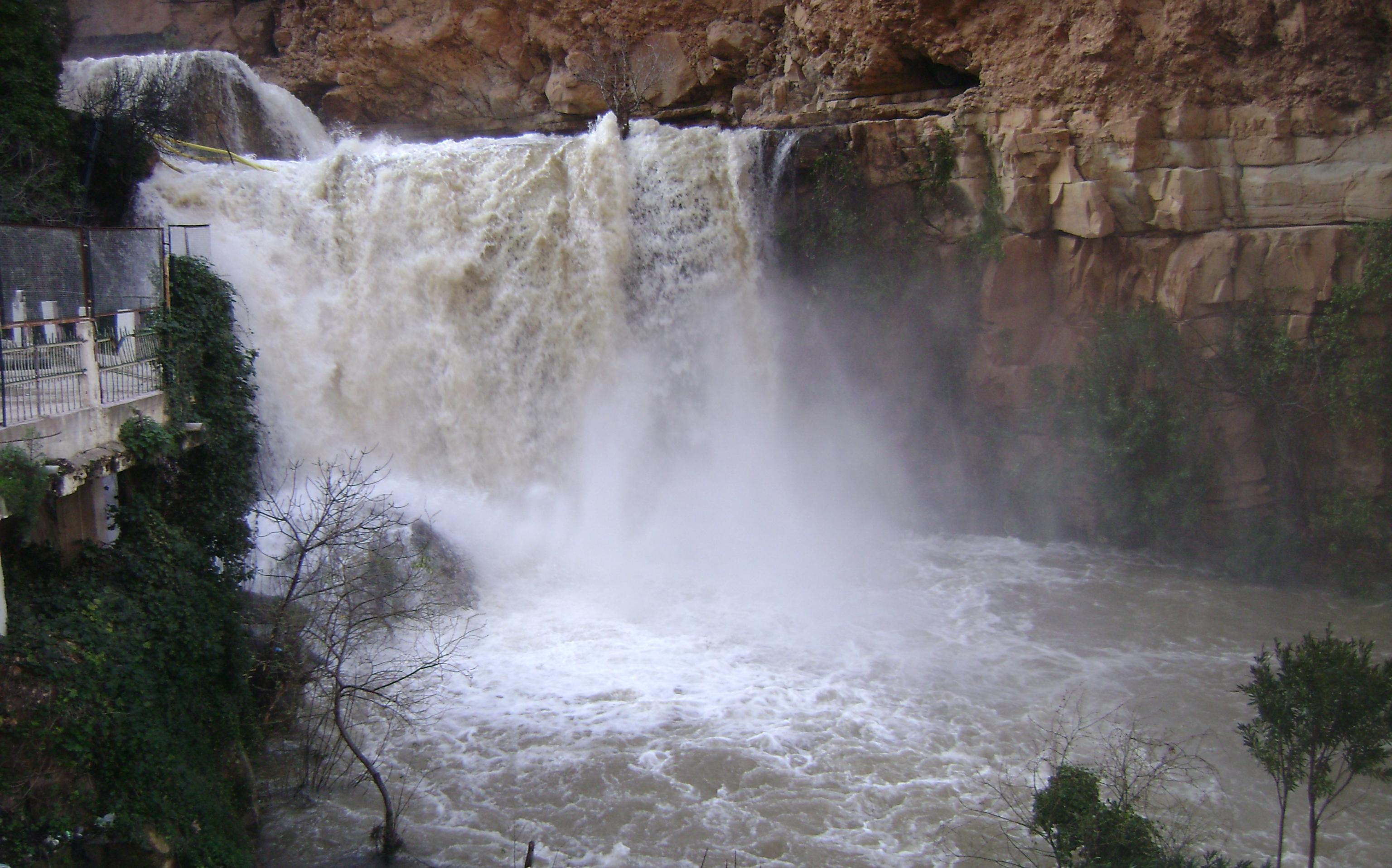 Cascade d'El-Ourit